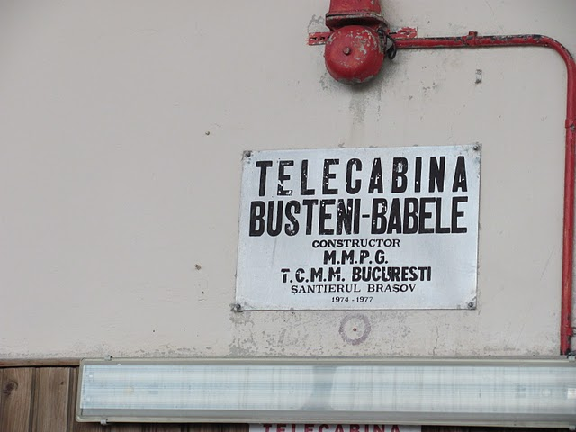 Constructorul telecabinei Busteni-Babele